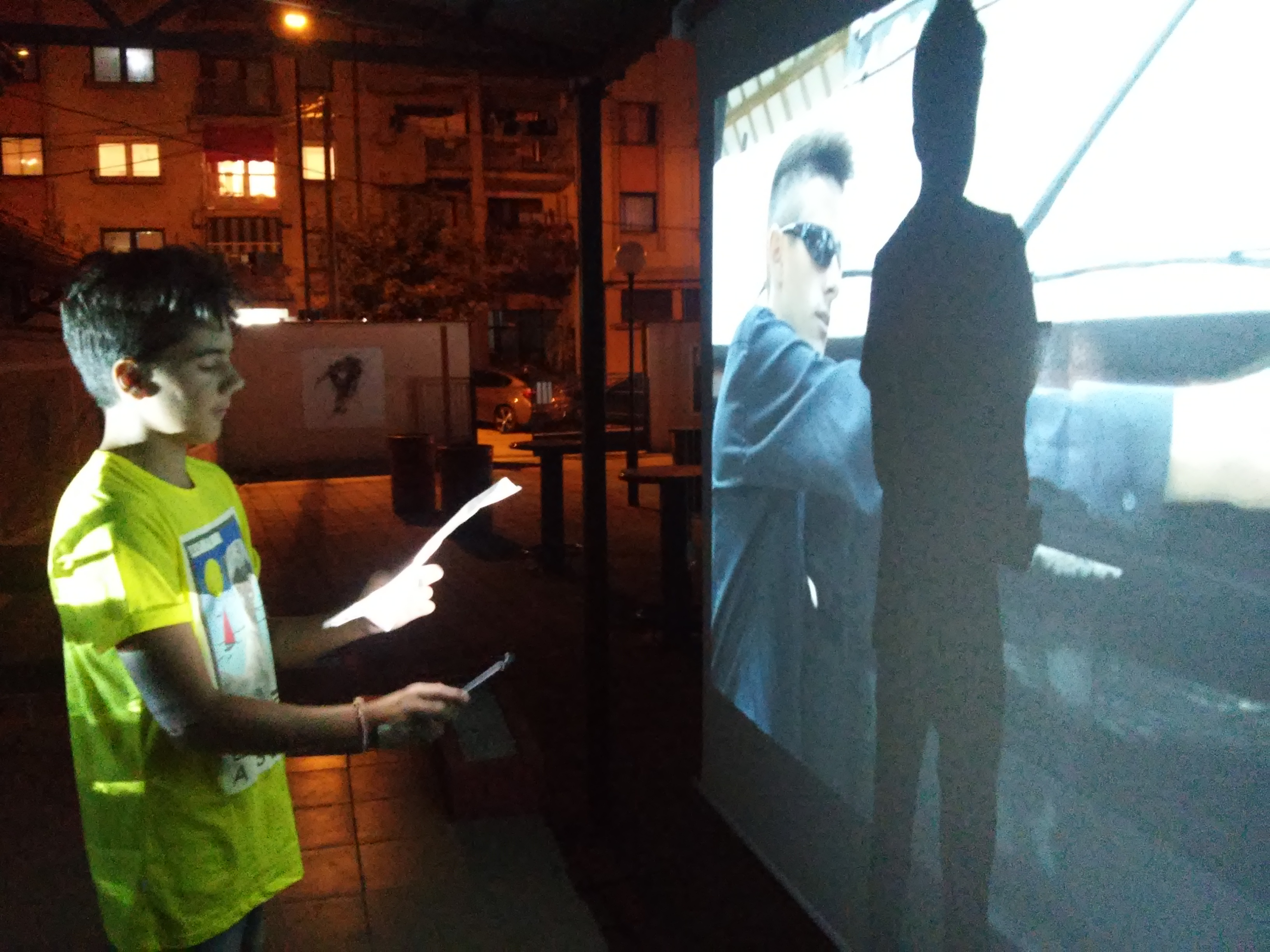 Пројекција У клубу Младих